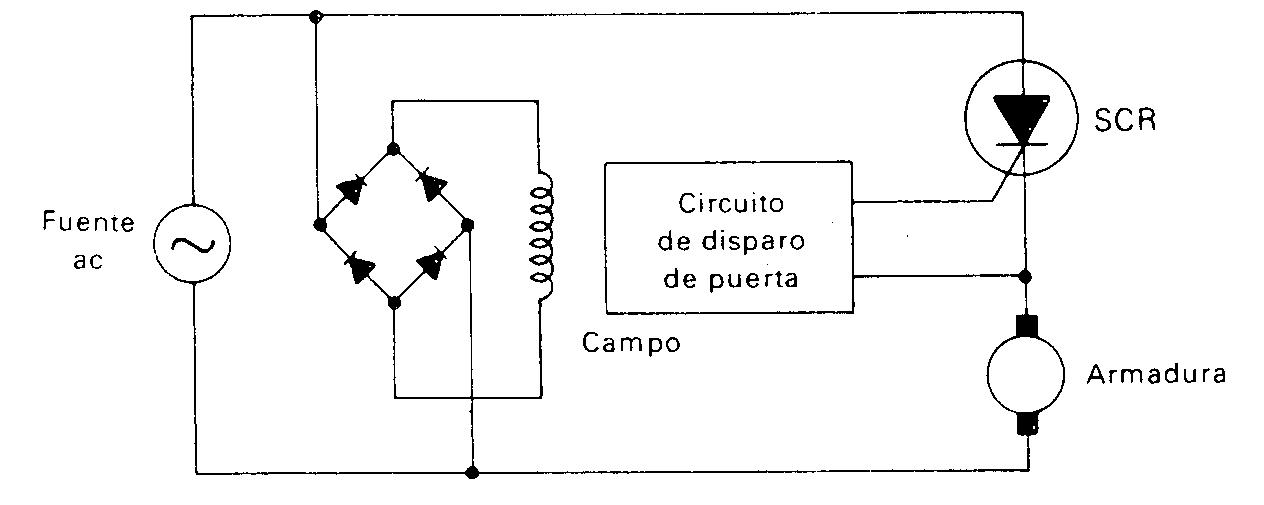 Circuito para el control de un Motor CD.